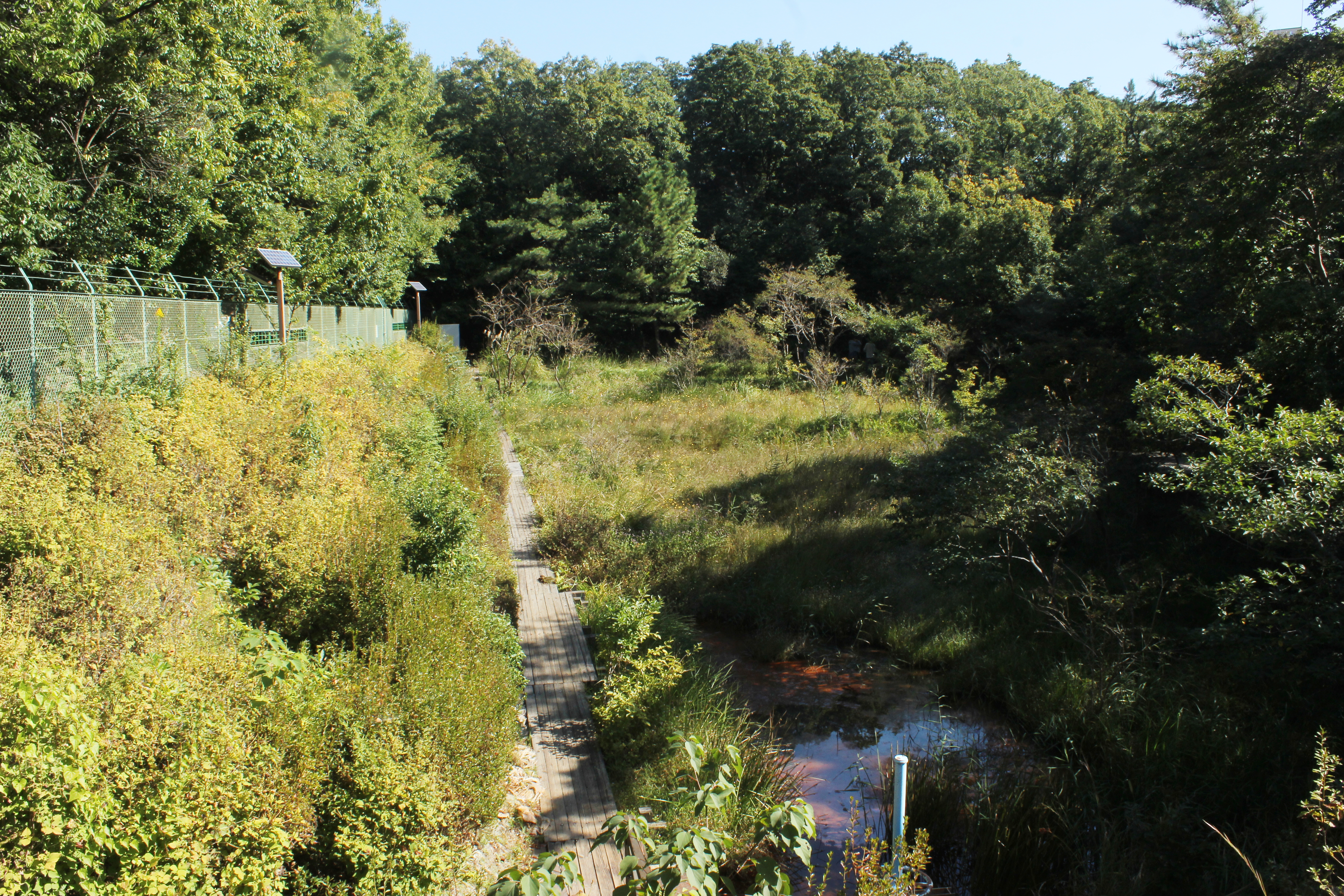 島田緑地 入口からの風景